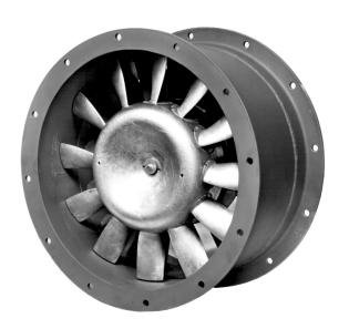 Axial-Ventilator mit verstellbaren Schaufeln